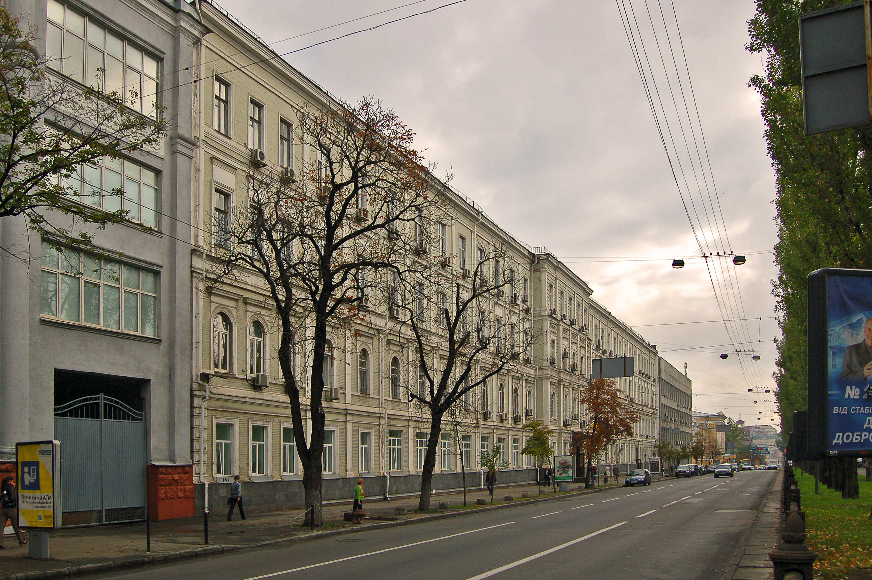 Будинок № 18 по бульвару Тараса Шевченка у Києві